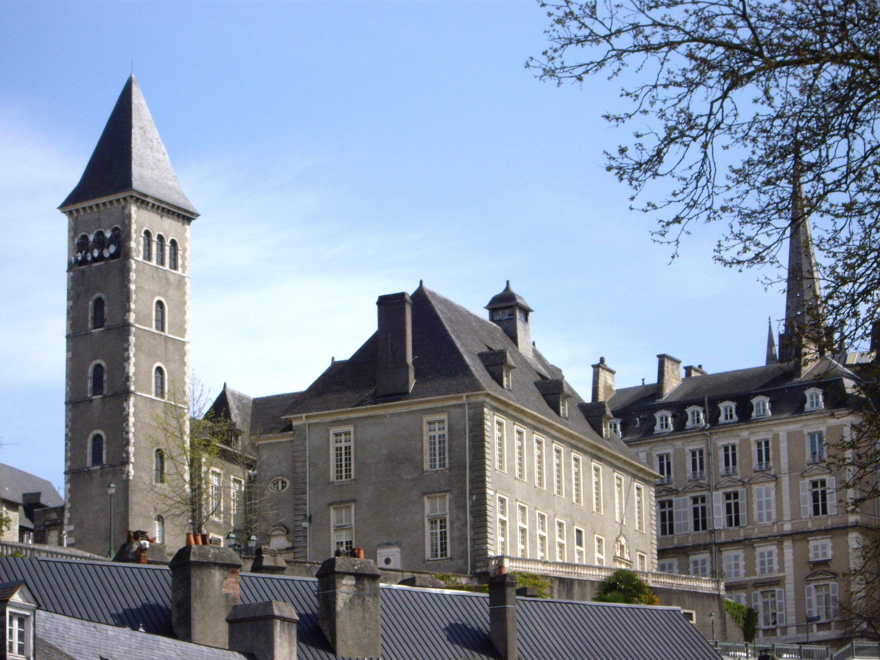 Parlement de Navarre (Pau, 64)